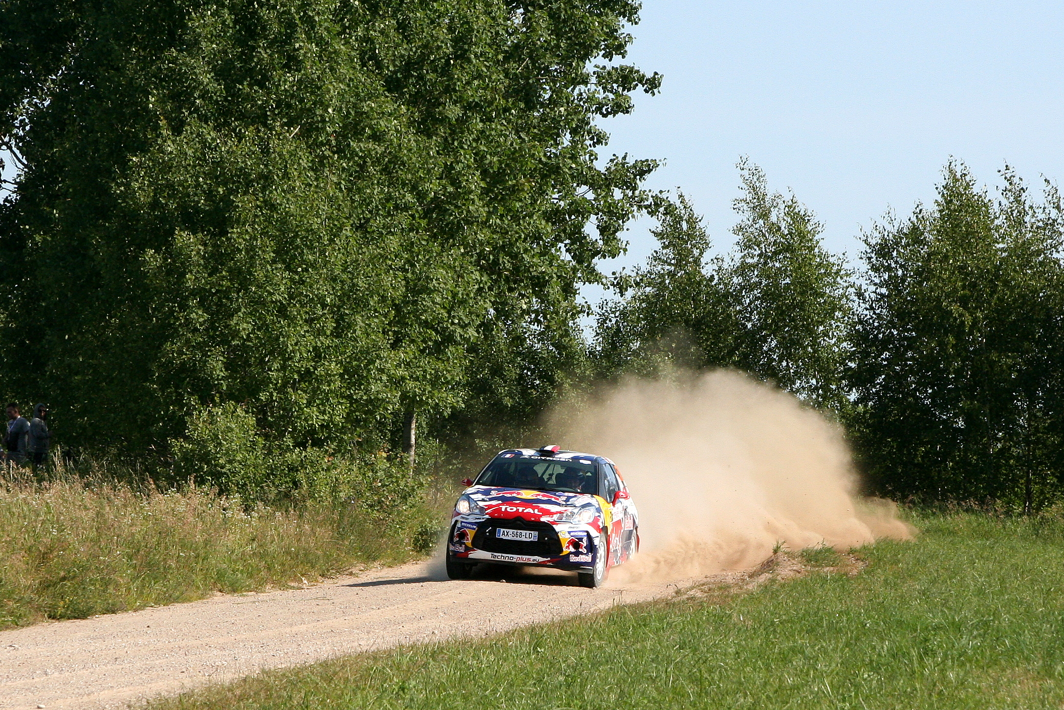 Stéphane Lefebvre podczas Rajdu Polski 2014, 11 OS Chmielówka 1